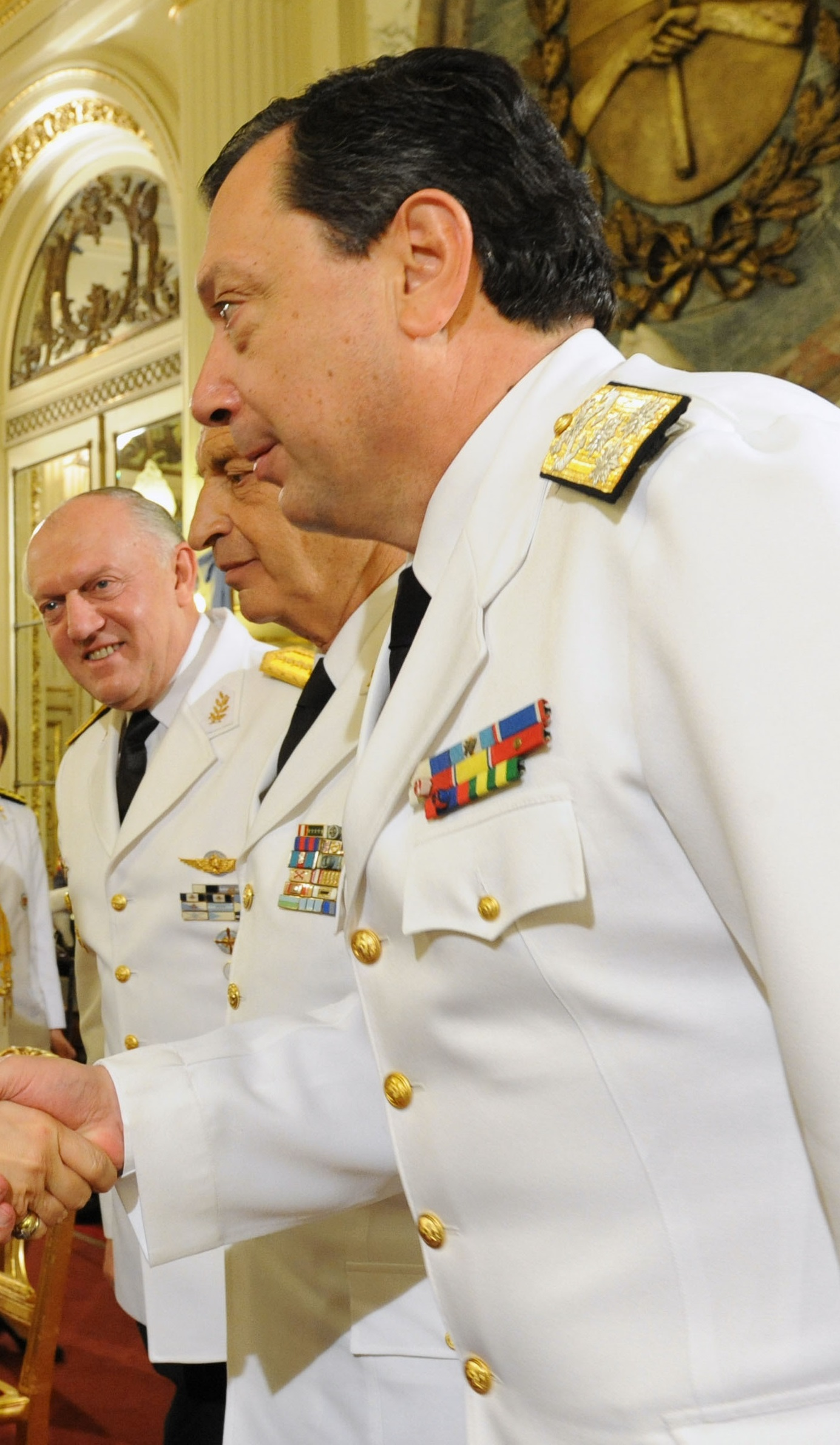 Almirante Carlos Paz, en el Salón Blanco de Casa de Gobierno.